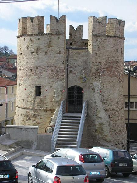 Torre difensiva aragonese, di forma cilindrica con merlatura ghibellina di coronamento.